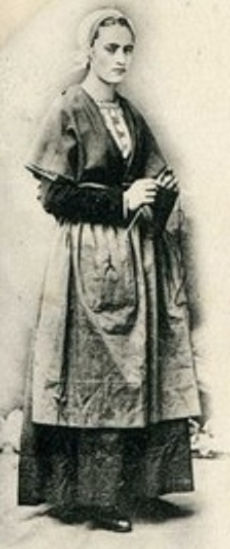 Sardinière de Douarnenez vers 1900